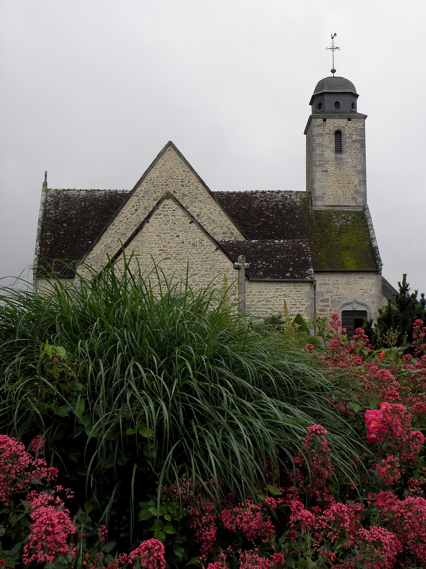 Extérieur de l'église Saint-Martin de Condé-sur-Sarthe (61). Chevet.